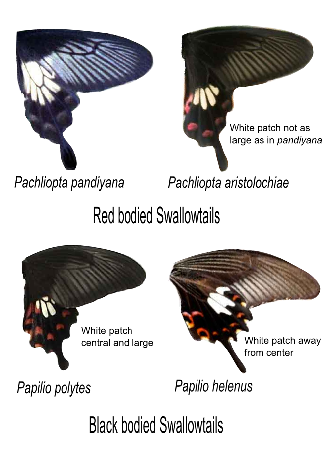 Atrophaneura pandiyana (= Papilio pandiyana), Atrophaneura aristolochiae (= P. aristolochiae), P. polytes, P. helenus.